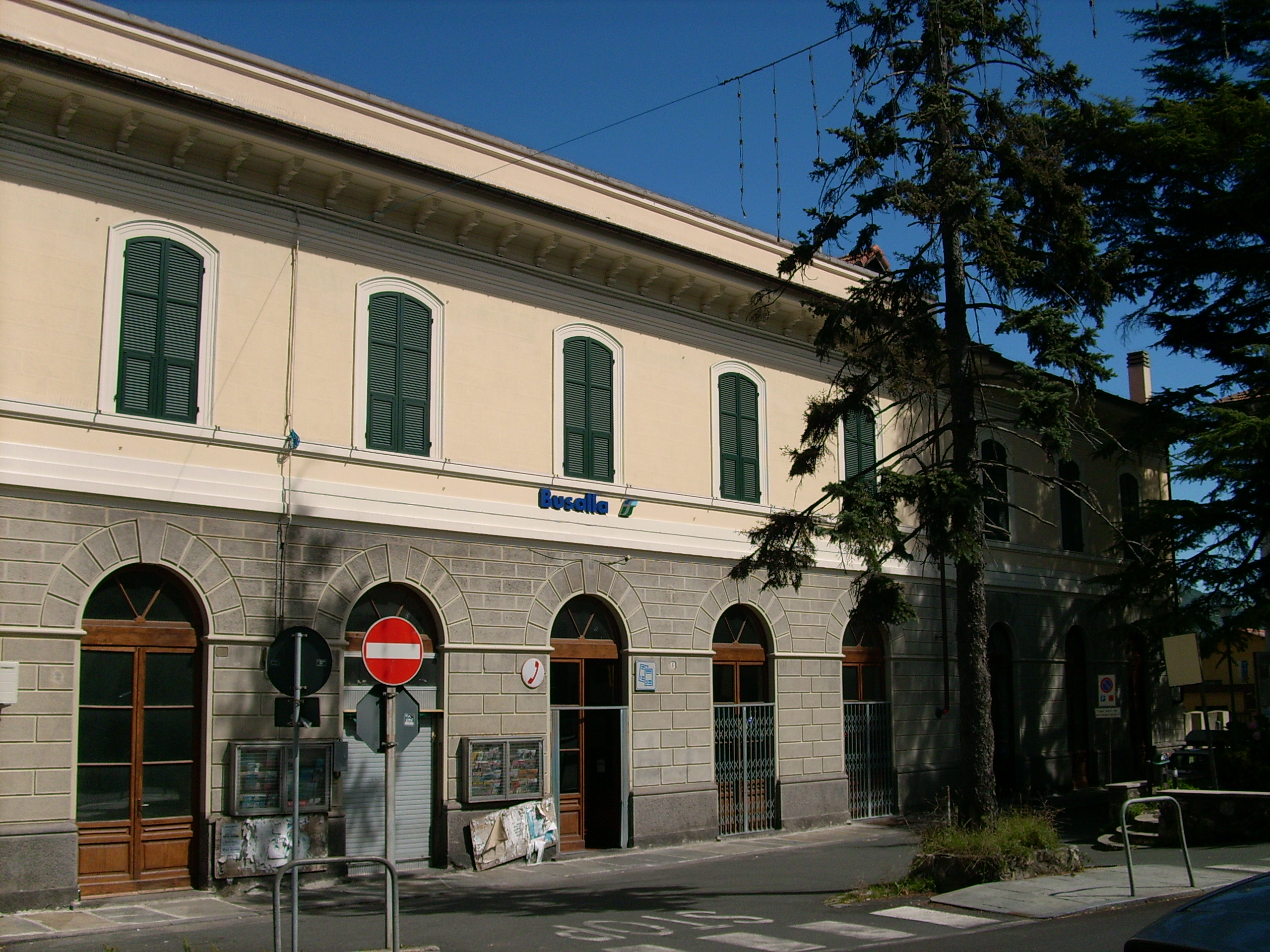 Stazione ferroviaria di Busalla, Liguria, Italia